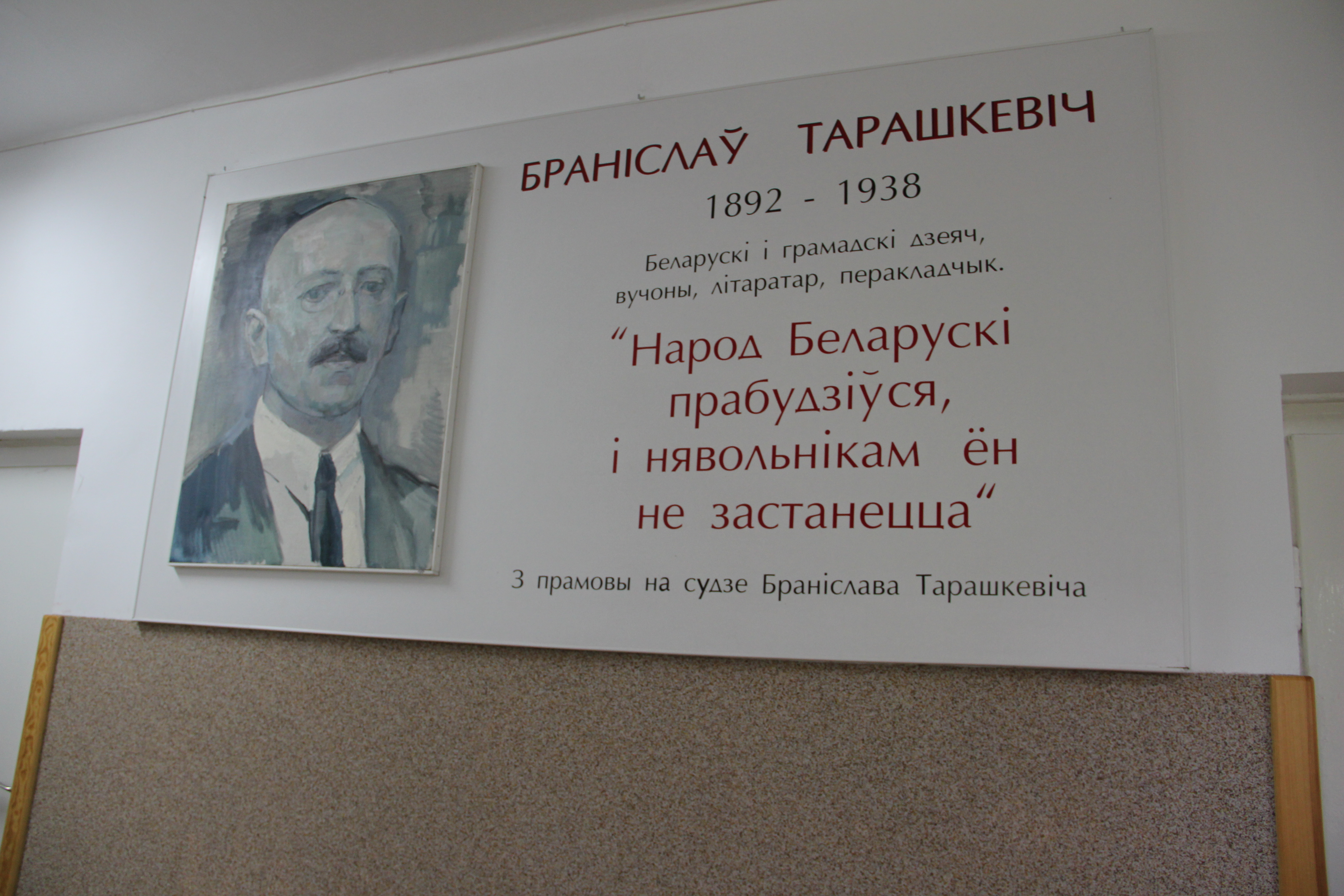 II Liceum Ogólnokształcące w Bielsku Podlaskim.